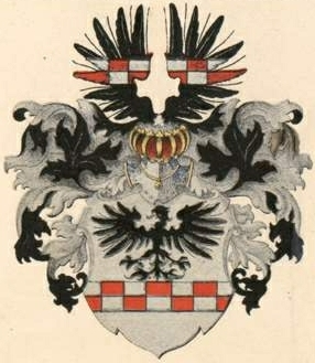 Fircksi suguvõsa parunivapp